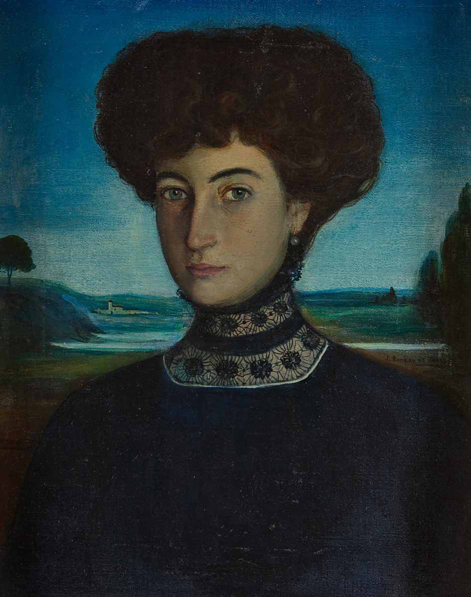 Retrato de la Condesa de Casa Rojas. 1905. Óleo sobre lienzo. 50 x 41 cm. Colección particular.